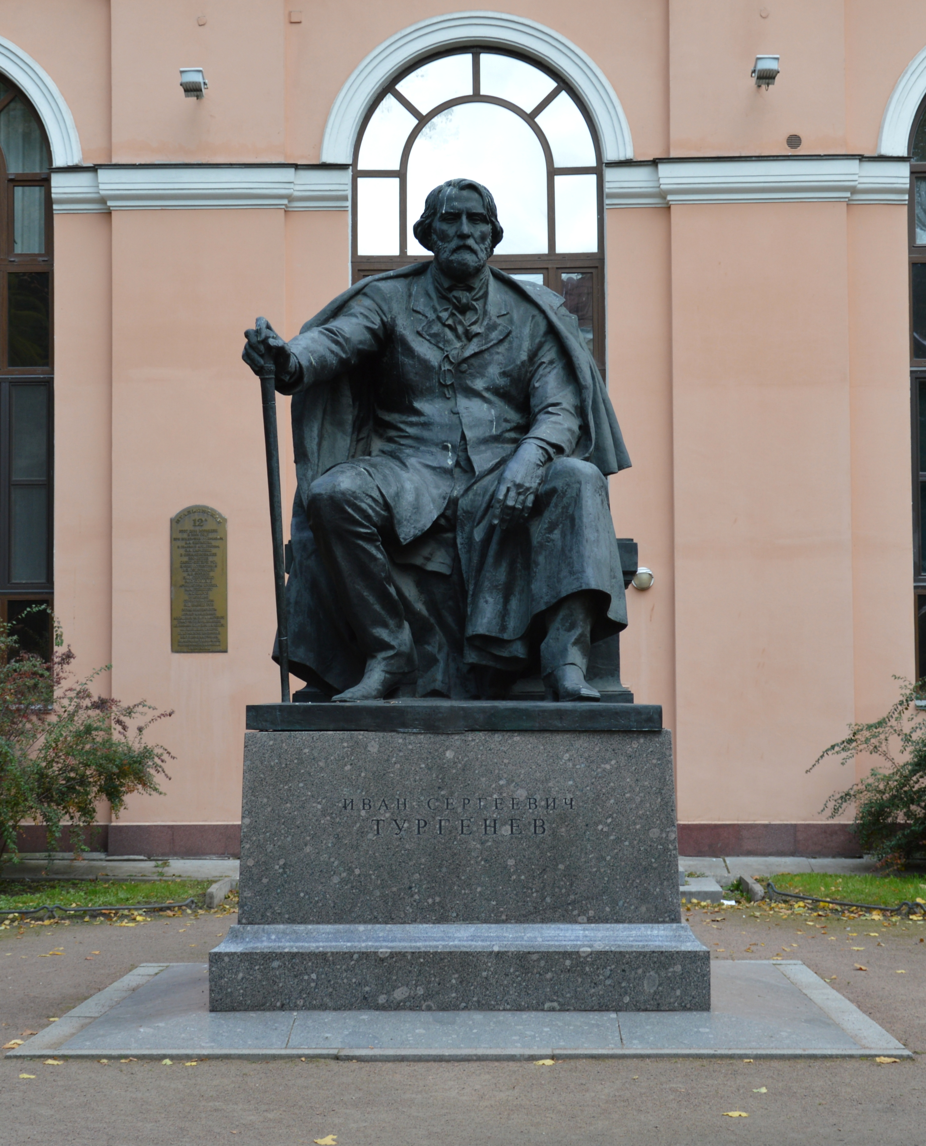 Denkmal Turgenjew in Sankt Petersburg